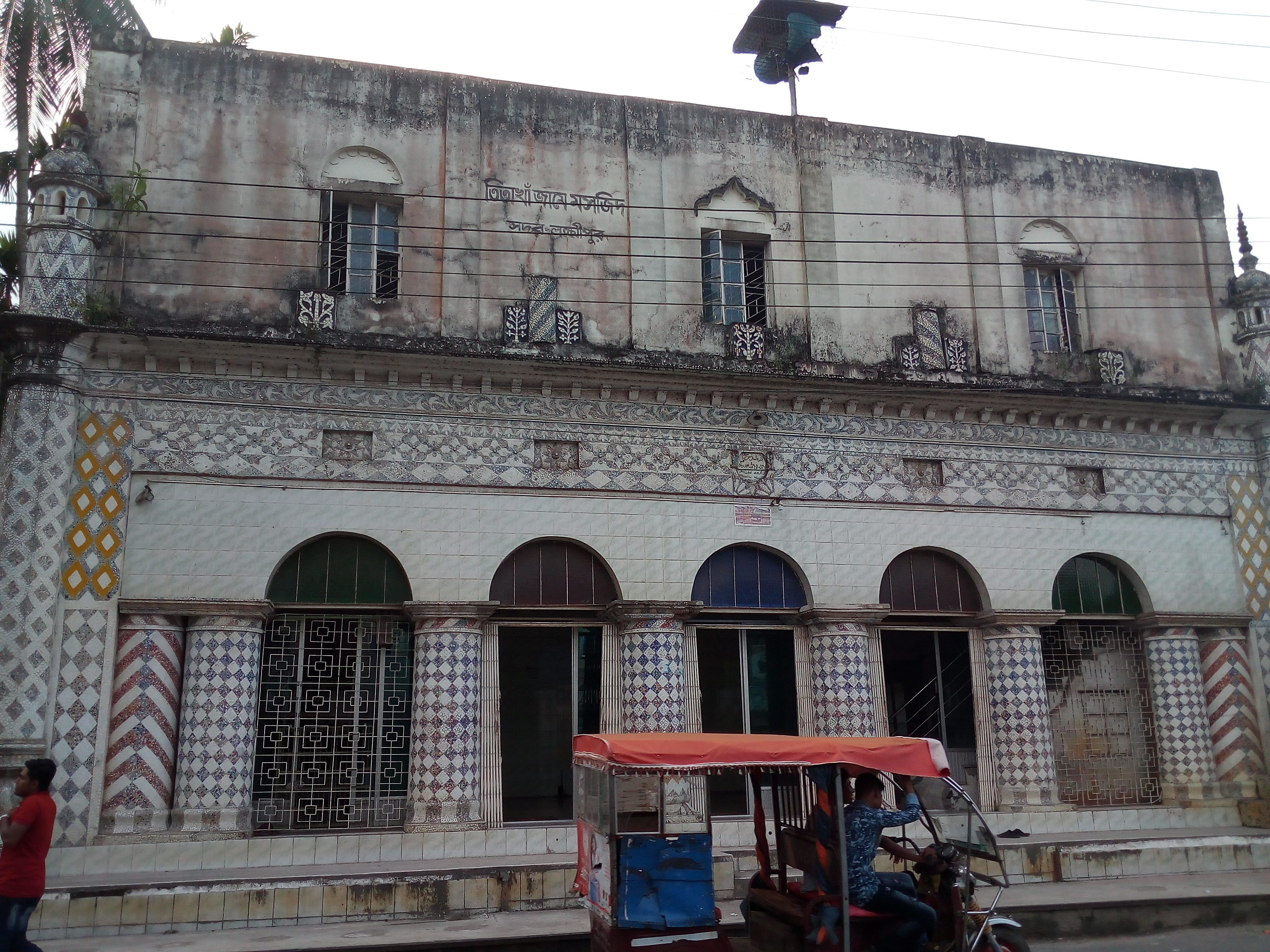 তিতা খাঁ জামে মসজিদ